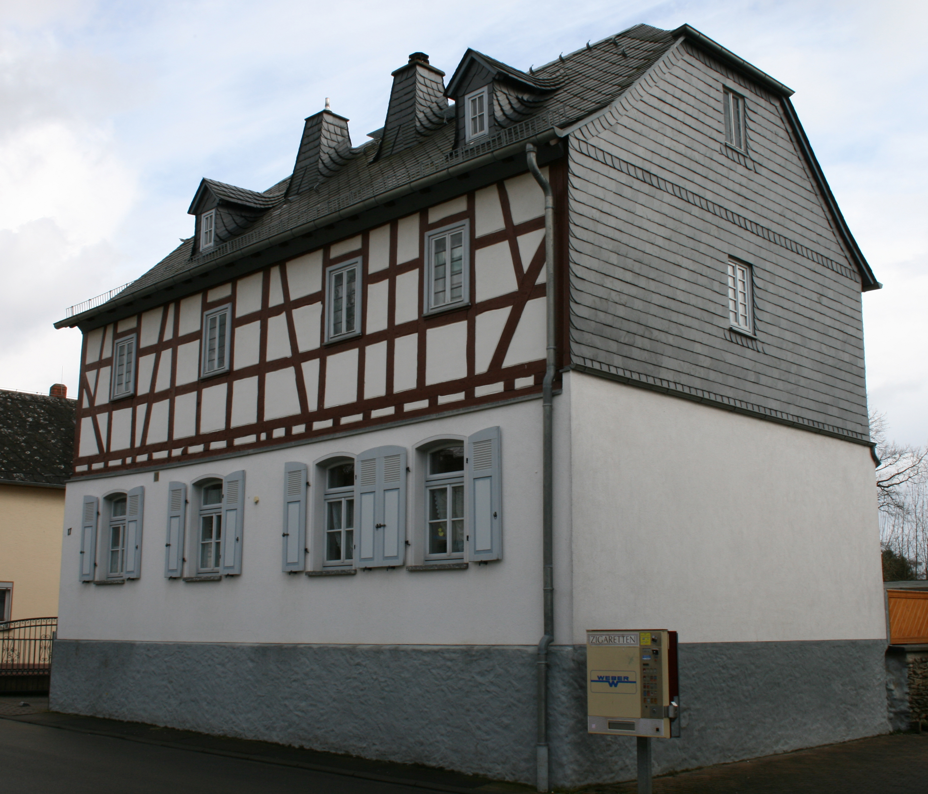 Alte Schule, Werschau, Deutschland